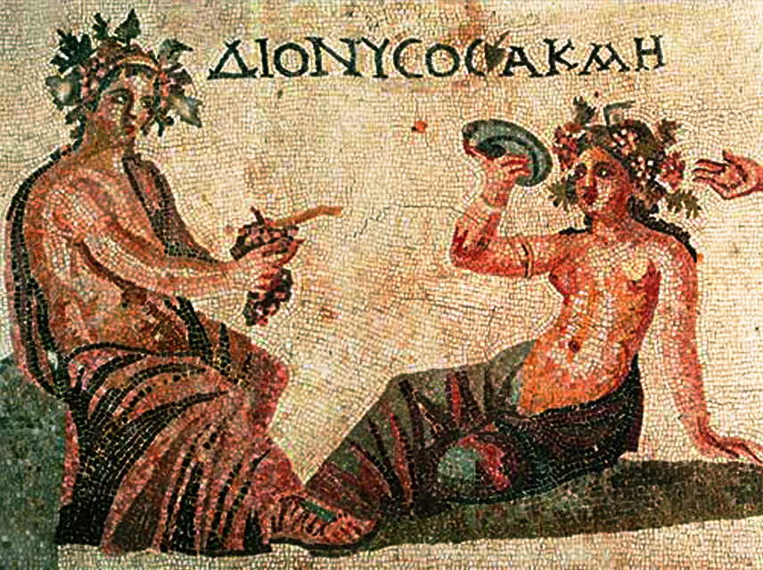 Mosaïque de la maison de Dionysos à Paphos